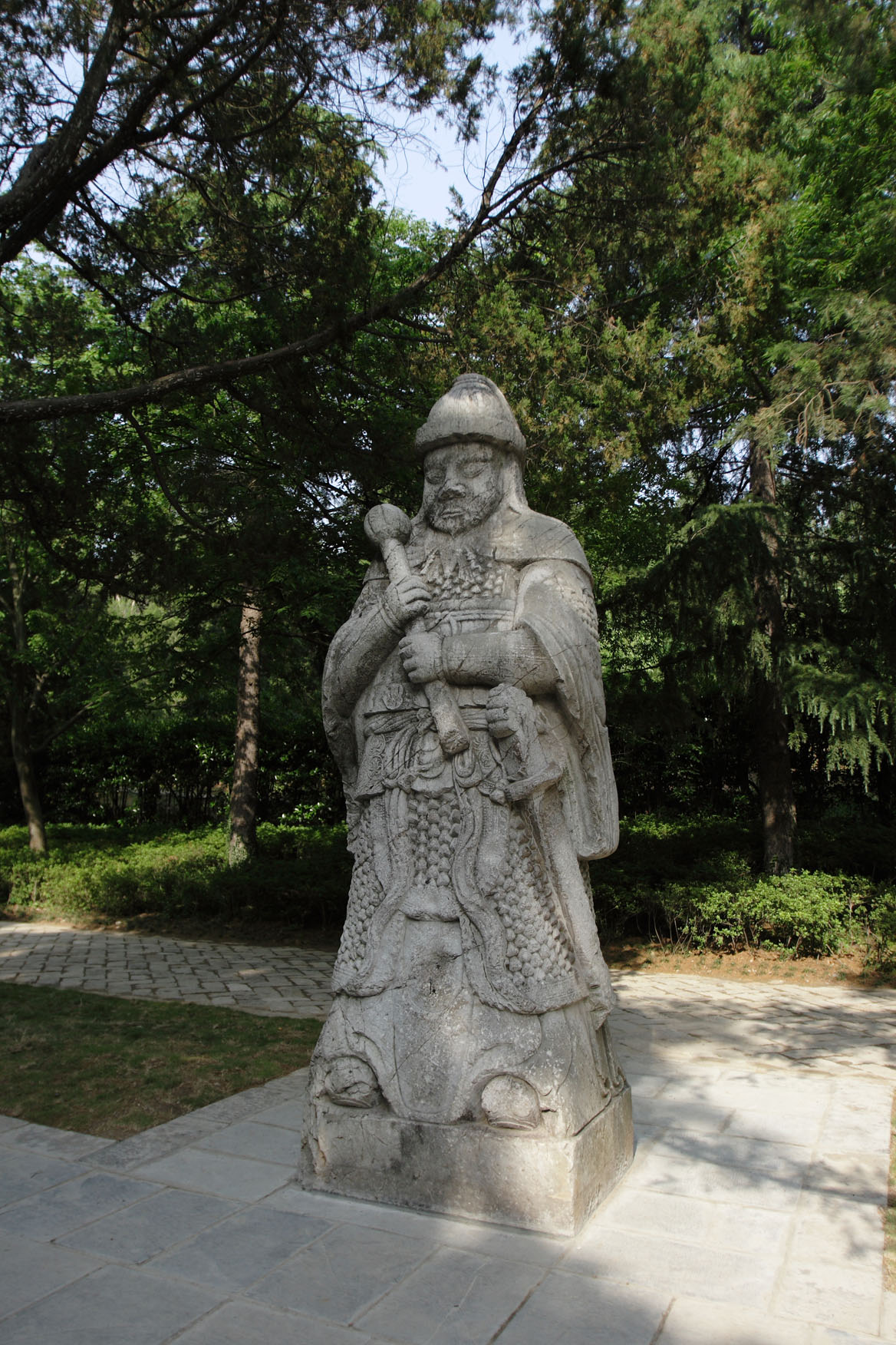 Ming Xiaoling Mausoleum; 明孝陵 at Nanjing